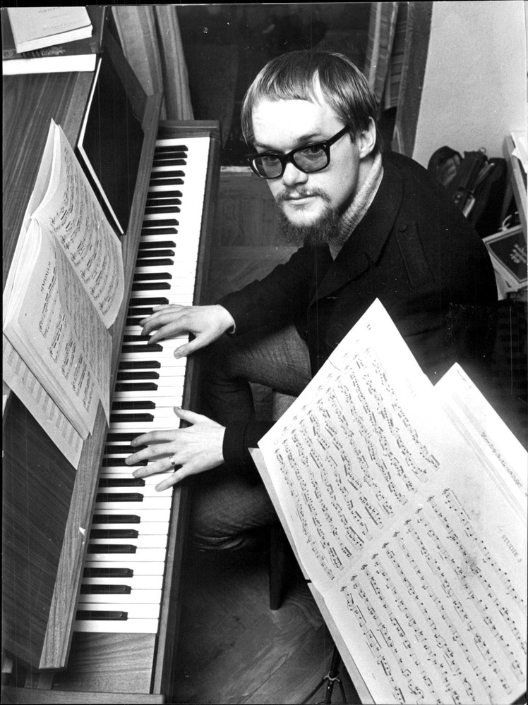 Bengt Ernryd (f. 1943). Införd i SvD 1968-09-27 s. 22.